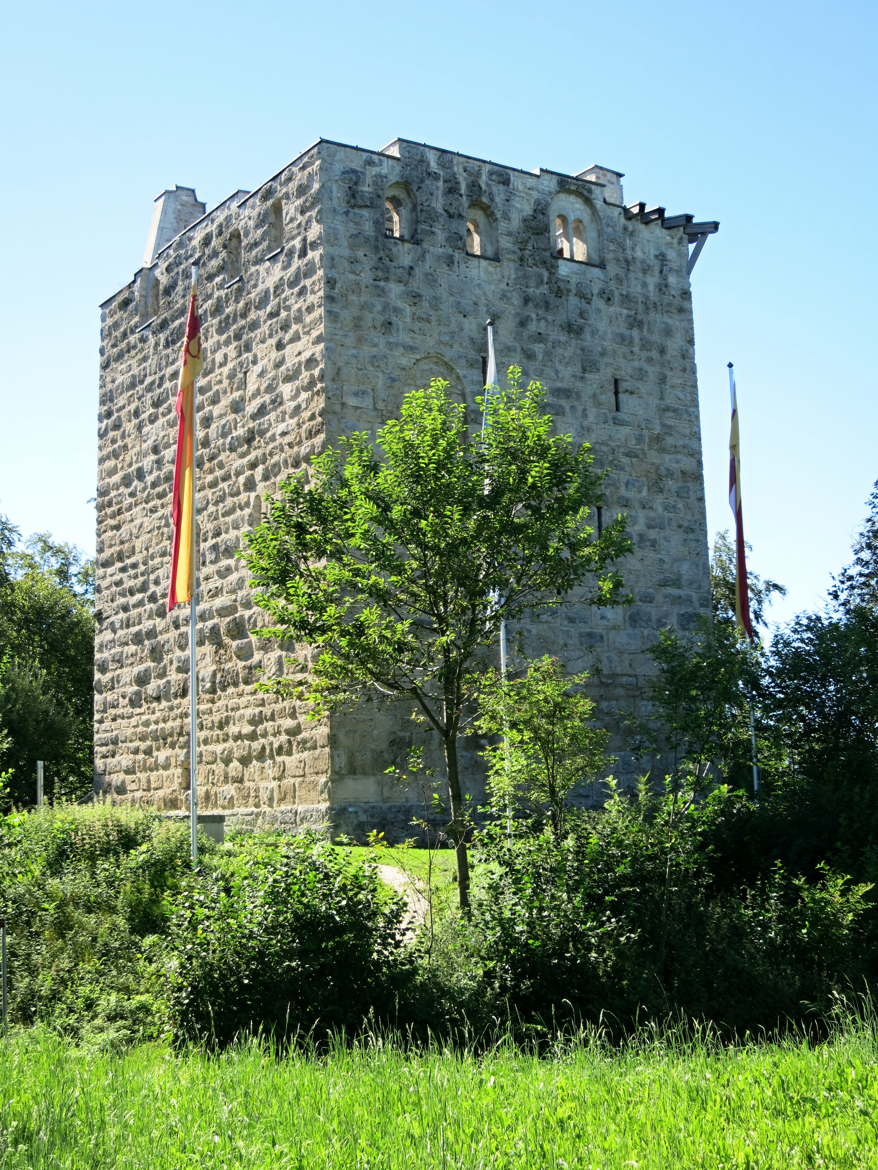 Aussichtsturm Burgruine Kastelen